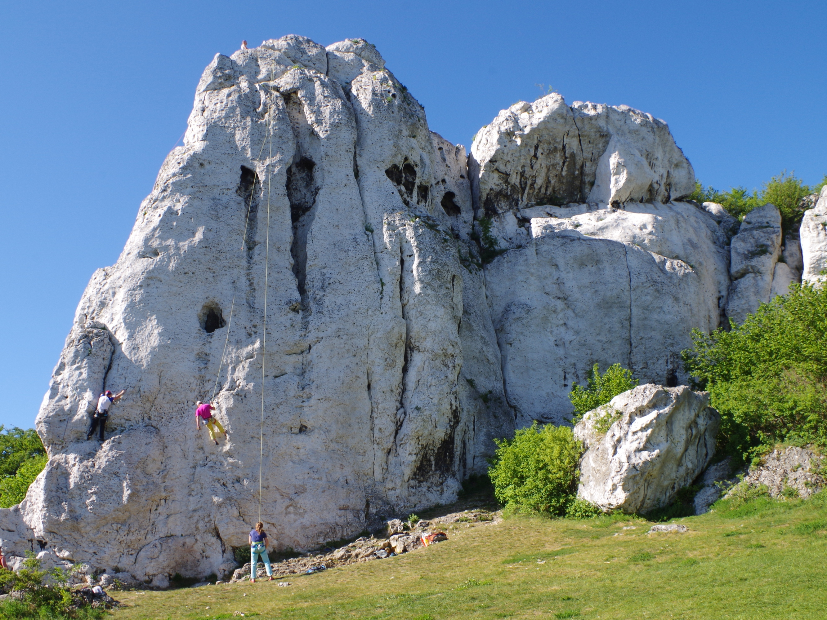 Skały Rzędkowickie. Turnia Lechwora i Brzuchata